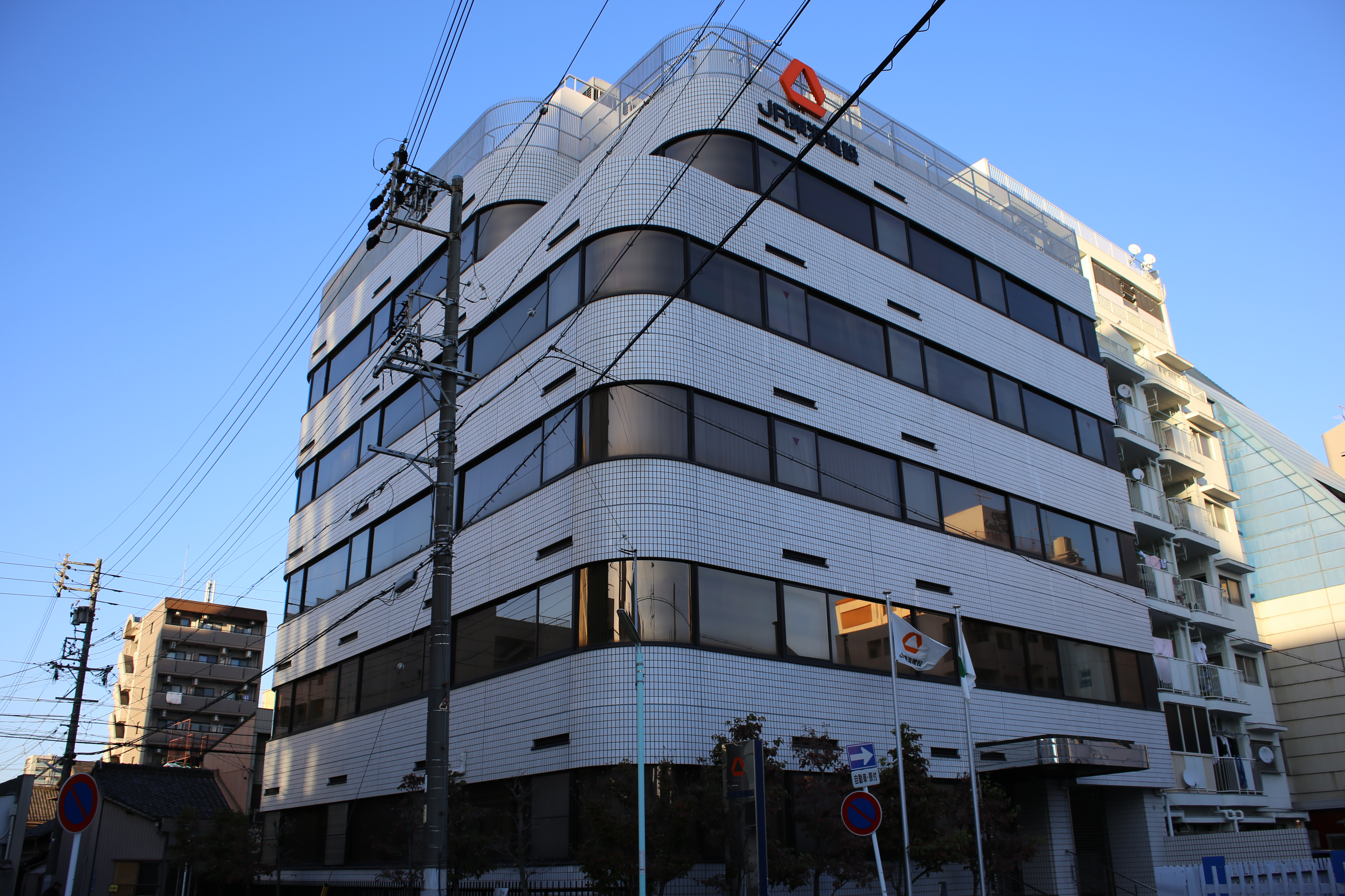 名古屋市中村区則武一丁目のJR東海建設本社を西側公道南側より撮影